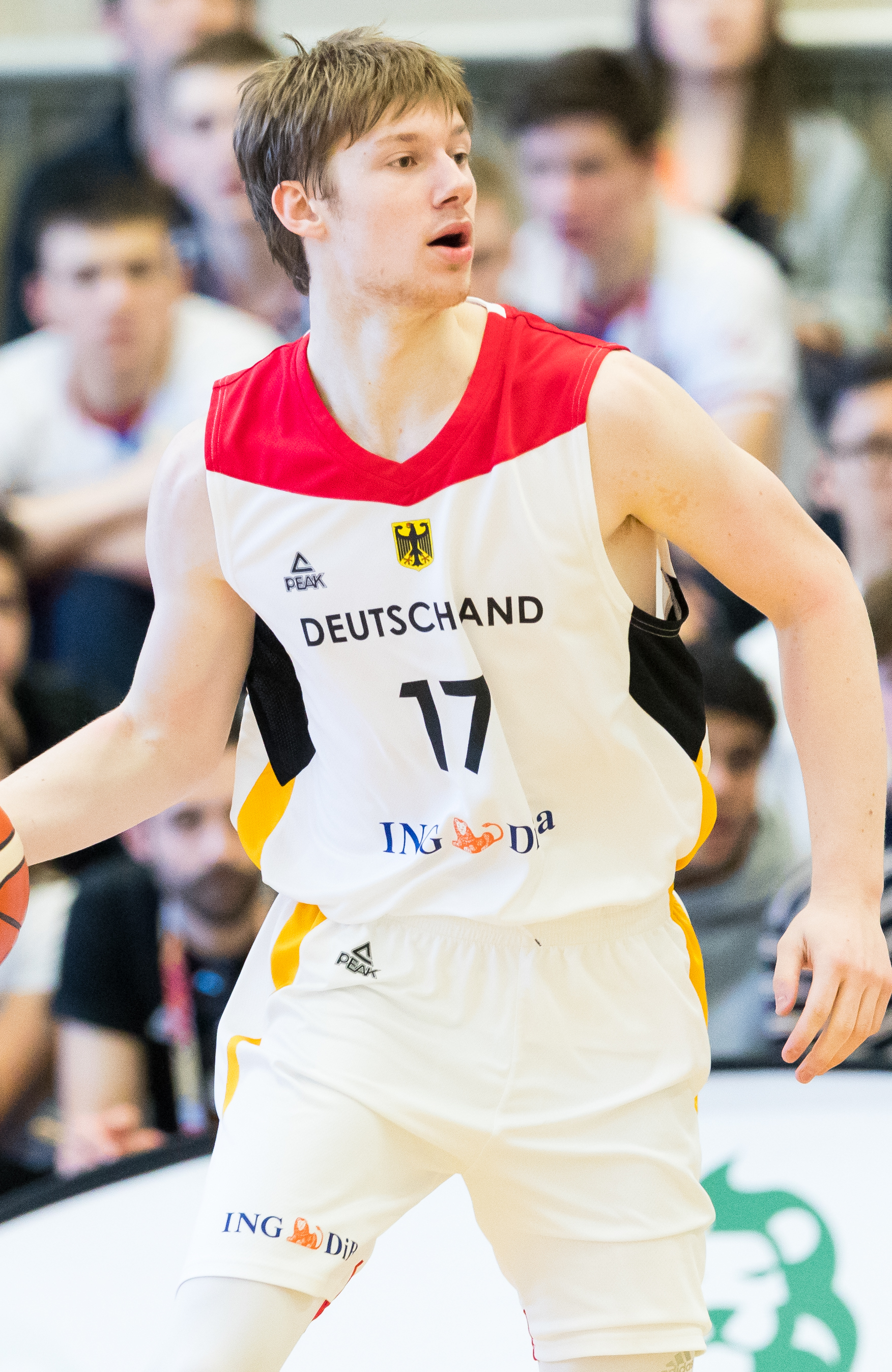 Australia vs Germany 66:88 during final Basketball Albert Schweitzer Turnier at GBG Halle, Mannheim, Baden-Württemberg, Germany on 2018-04-07, Photo: Sven Mandel